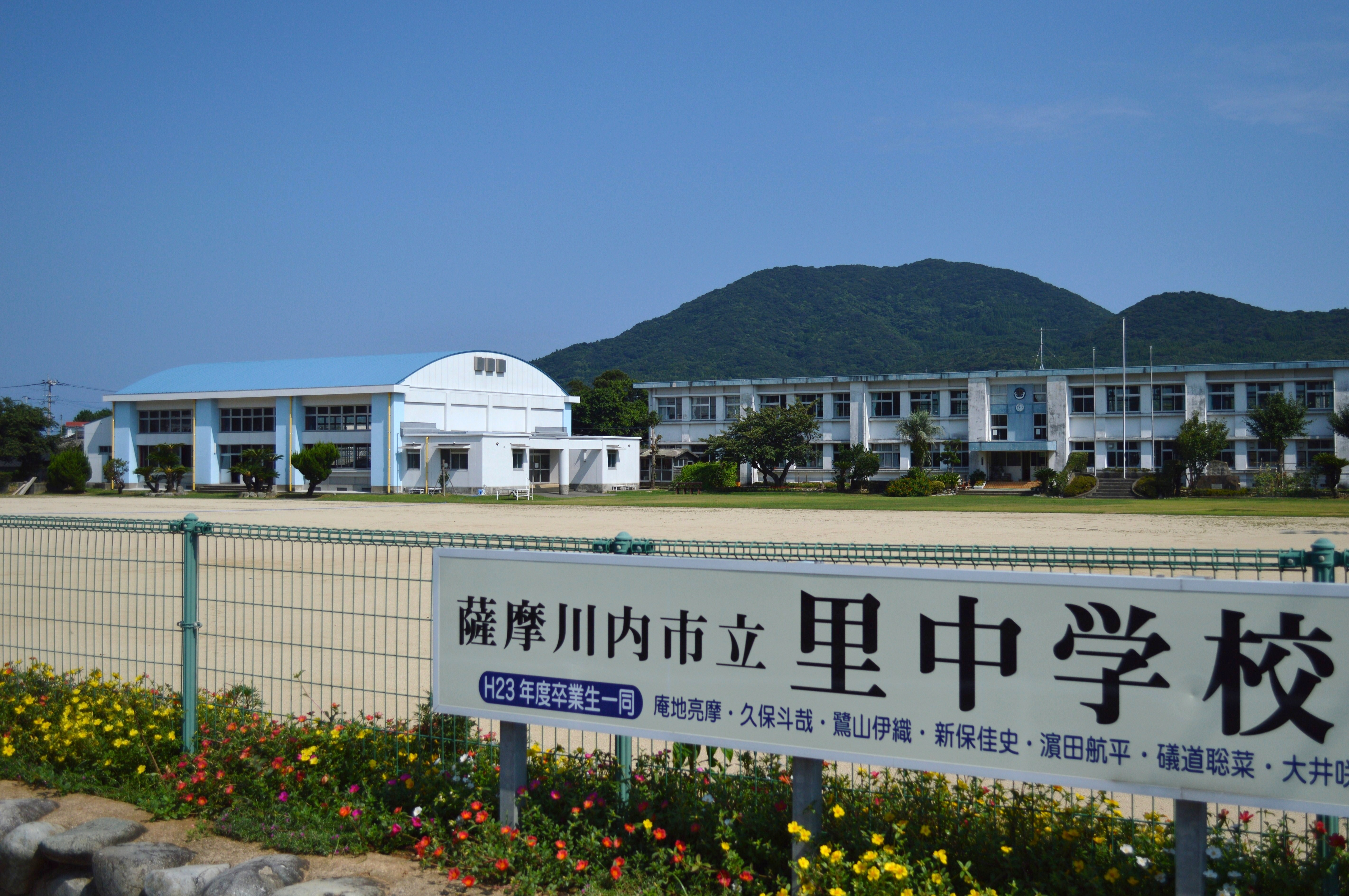 鹿児島県薩摩川内市の上甑島、里小中学校